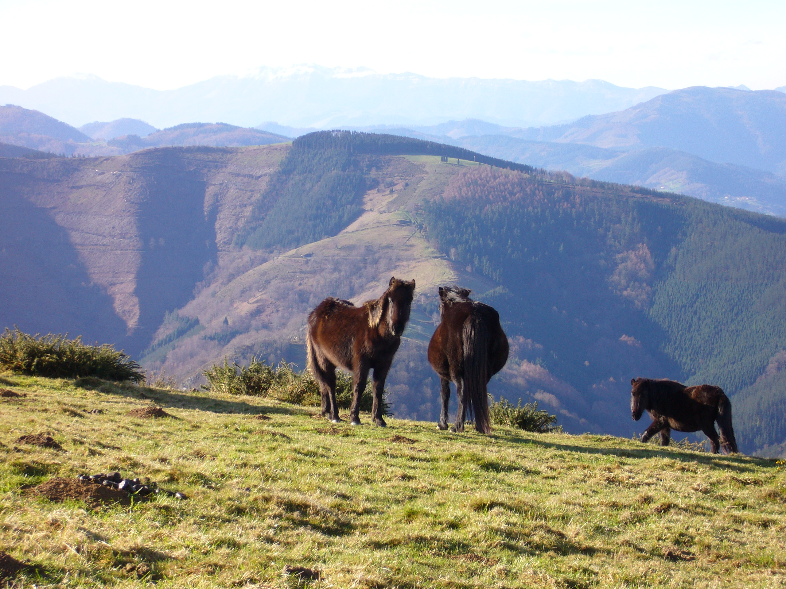 ZENBAIT POTTOK MUNIANDI MENDIAN, PAGOETAKO PARKE NATURALEAN